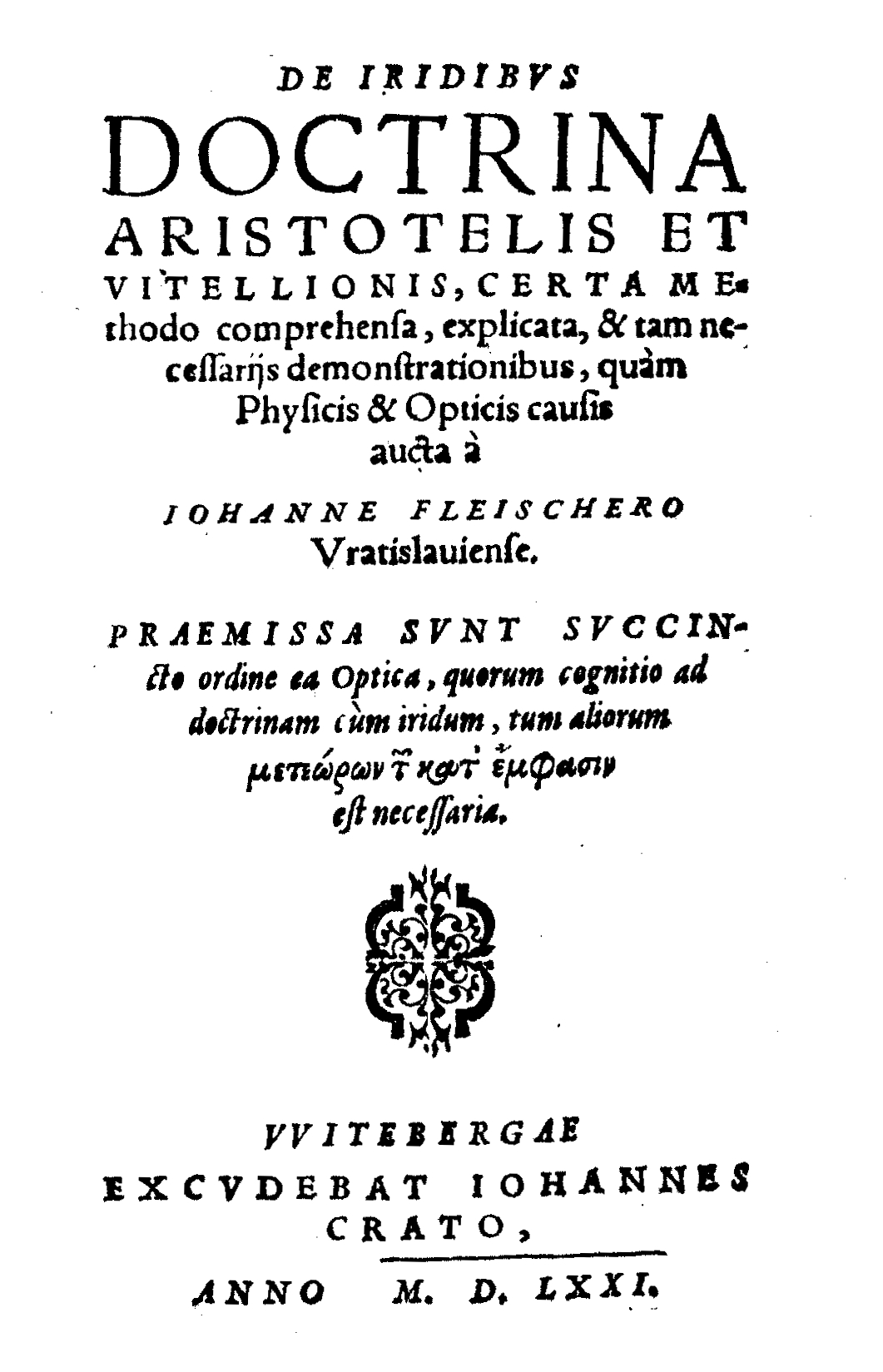 Frontespizio